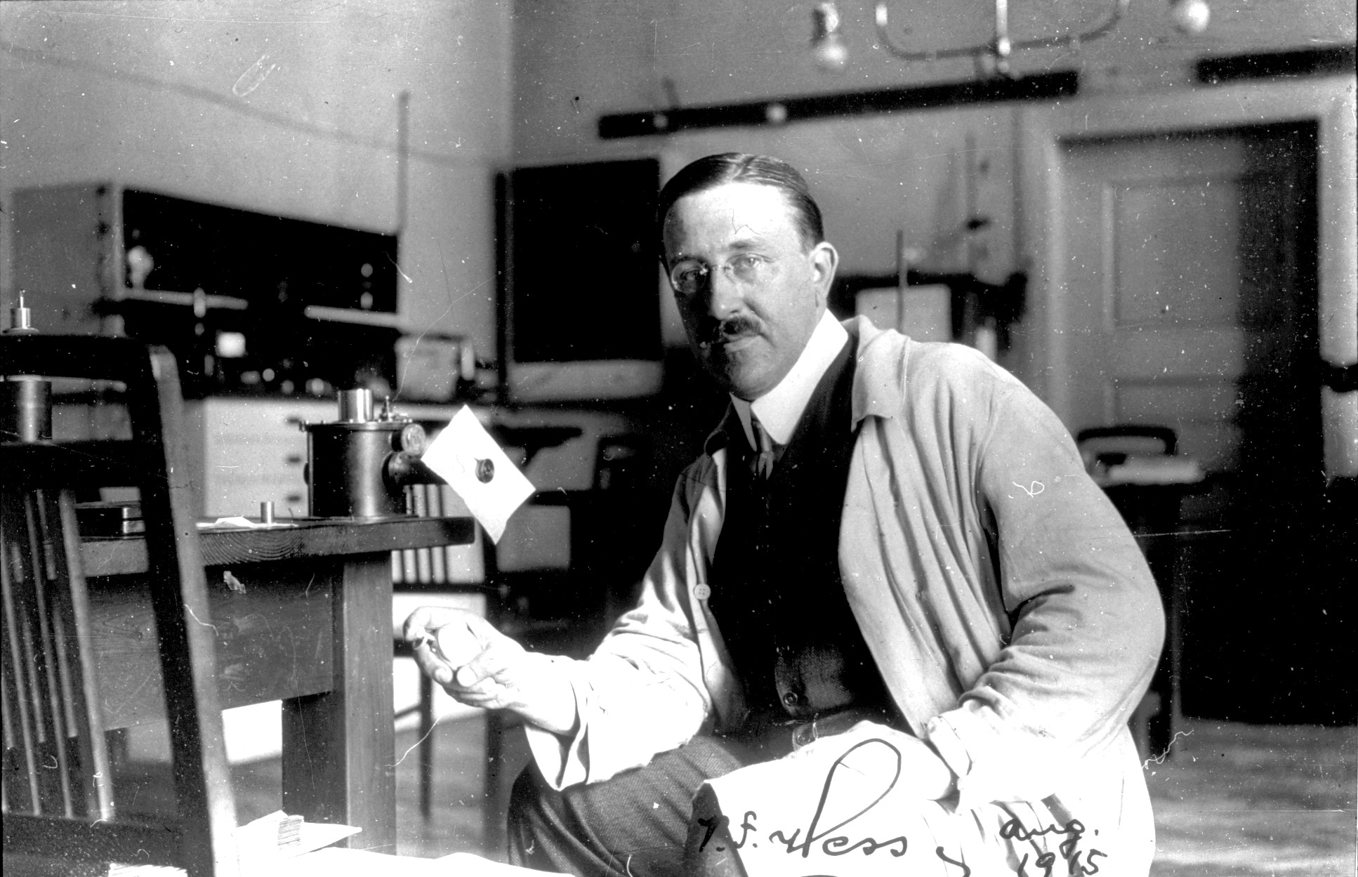 Viktor Hess im Jahr 1915